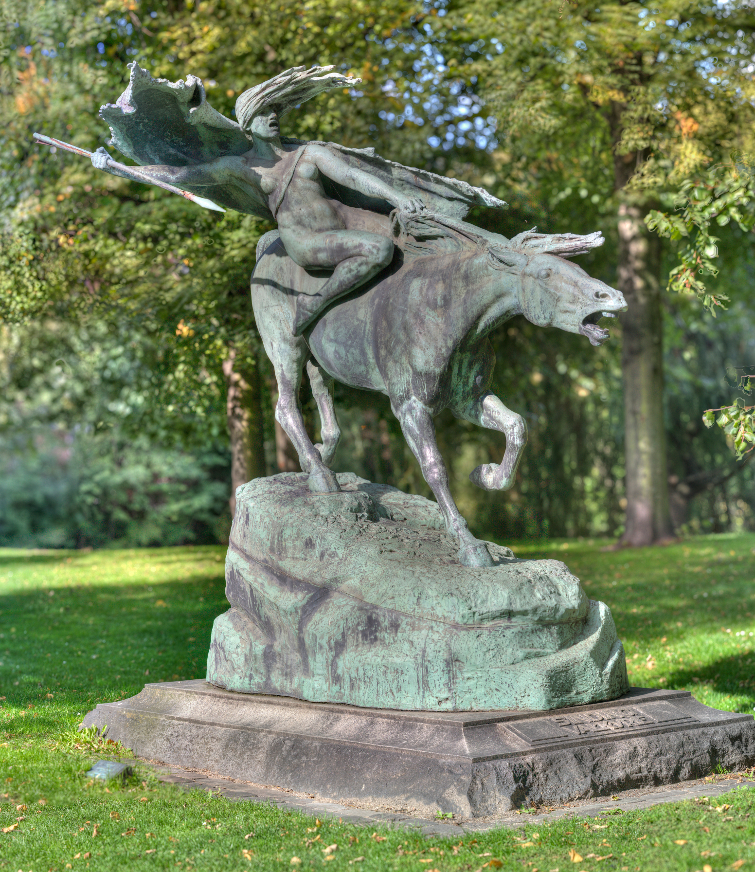 The 'Valkyrie' statue at Churchillparken in Copenhagen, Denmark